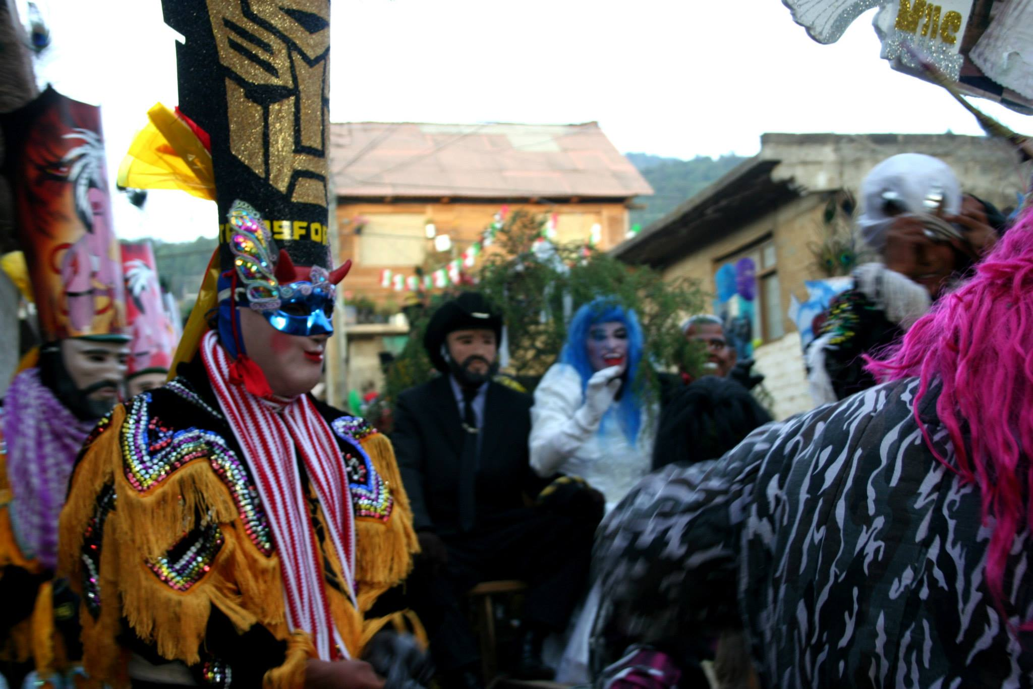 Hombre vestido de Chucky en en la Fiesta de los Chalis, Changos o Diablos en Comachuén